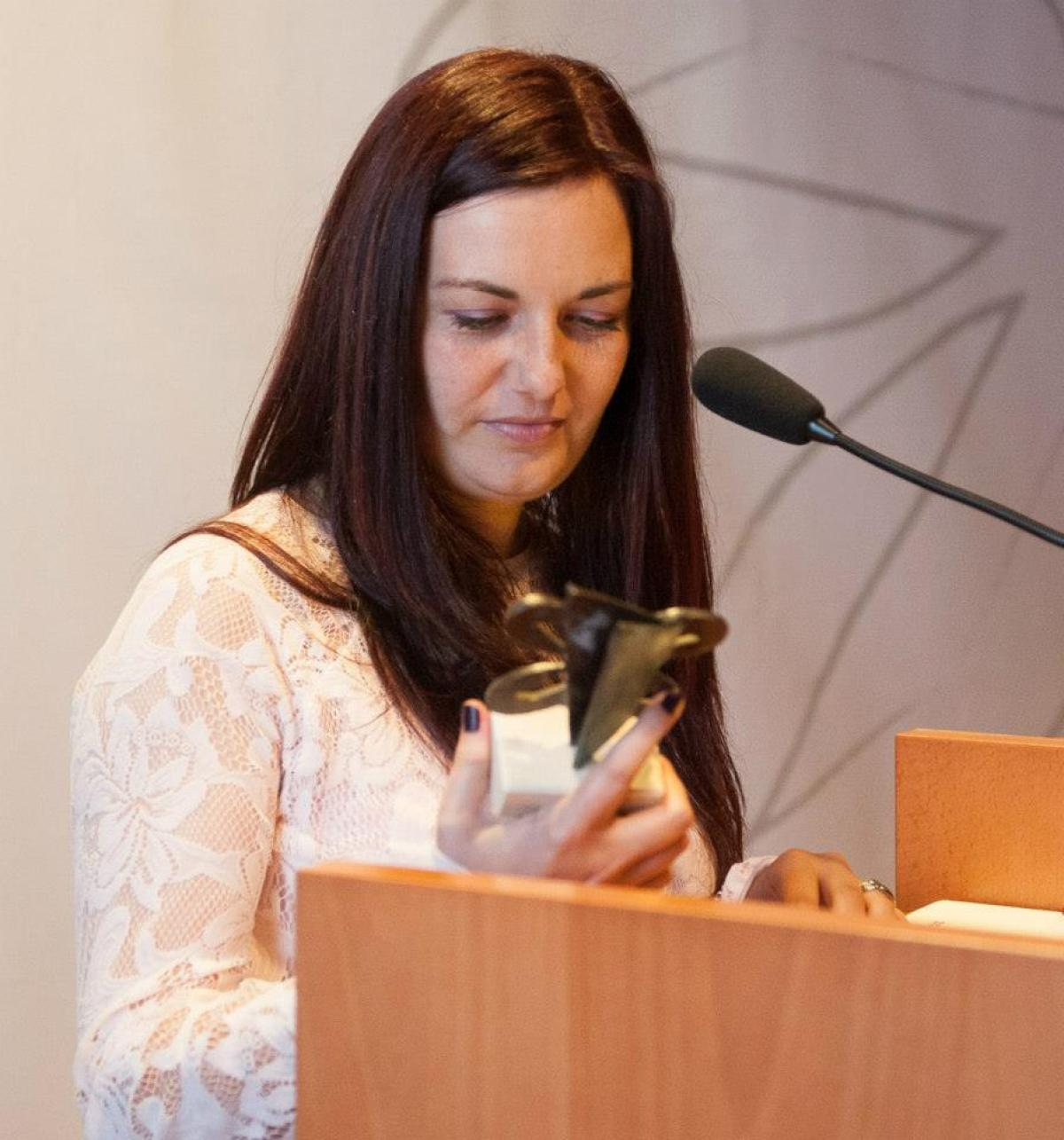 A escritora galega Ledicia Costas